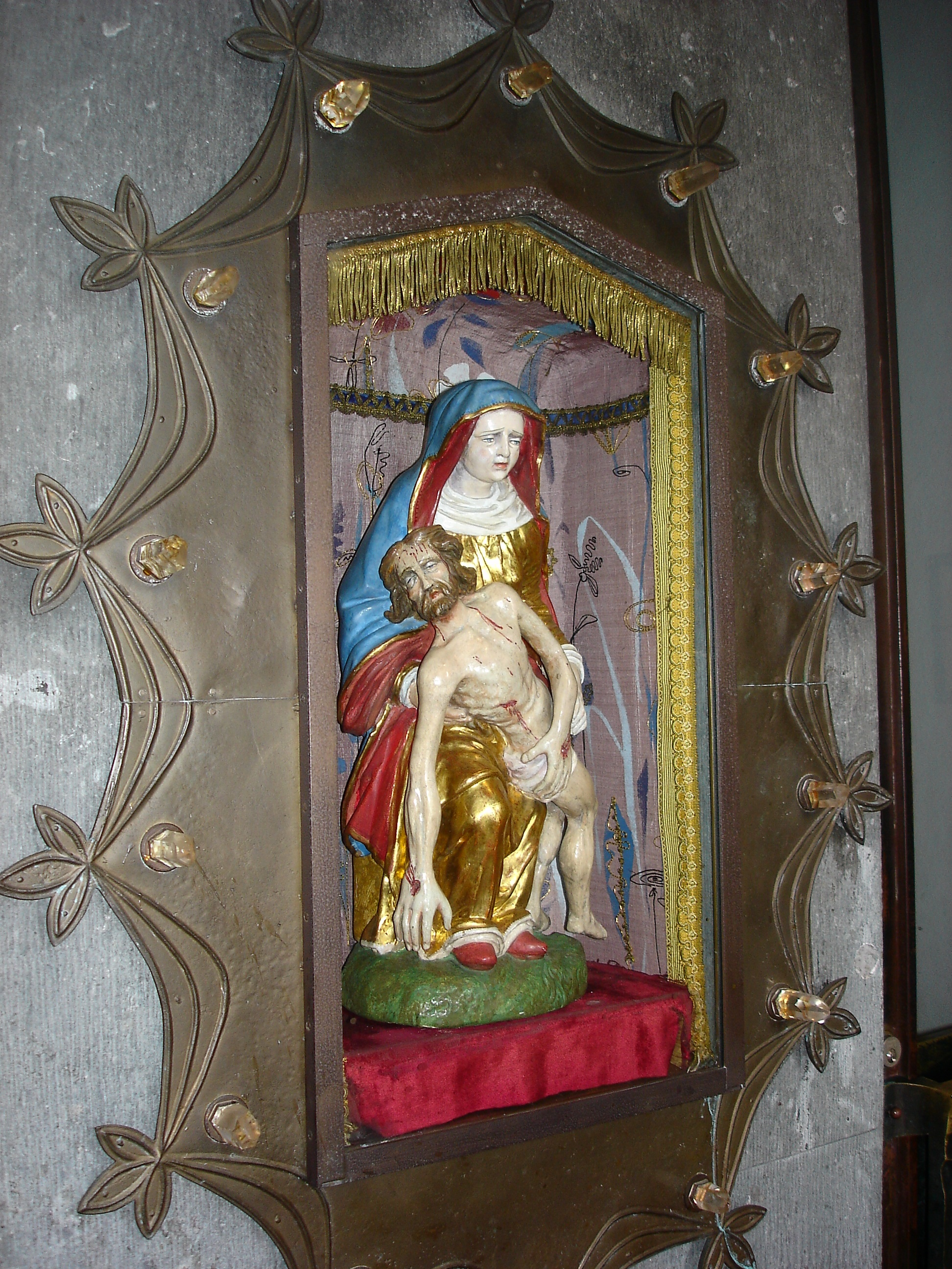 Pieta von St. Maternus in Köln-Rodenkirchen